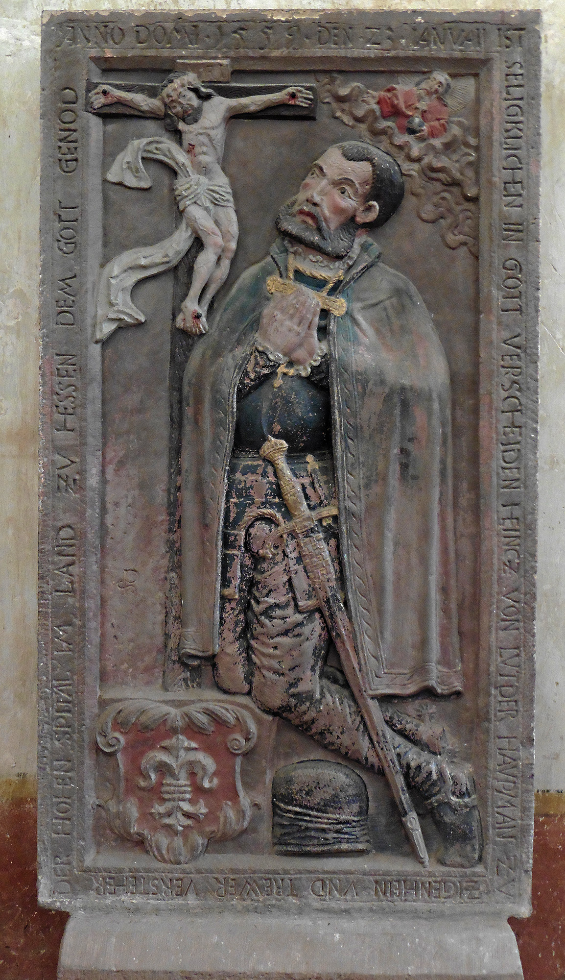 Epitaph des Heinz von Lüder/Lutder, Hospitalvorsteher und Hauptmann von Ziegenhain (+ 1559) in der Kirche des ehemaligen Zisterzienserklosters in Haina in Hessen. Das Steinrelief wurde von dem Frankenberger Steinmetz Philipp Soldan geschafften. Ansicht von N. Inschriftentext: Anno Domi[ni] 1559 den 23 Janvaii ist seligklichen in Gott verscheiden HEINCZ VON LVTDER Havpman zv Zigenhein und trewer Versteher (Vorsteher) der Hohen Spital im Land zv Hessen Dem Gott genod